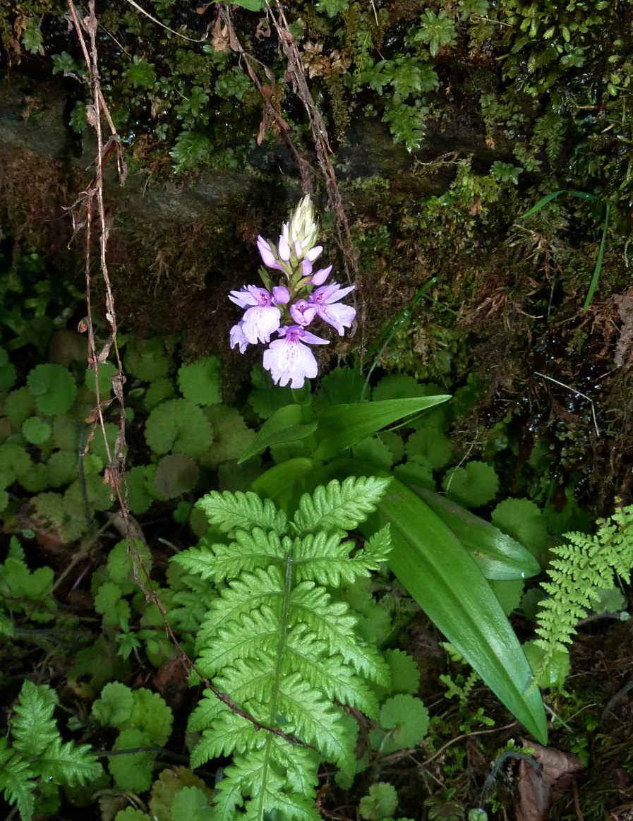 Dactylorhiza foliosa, Ile de Madère